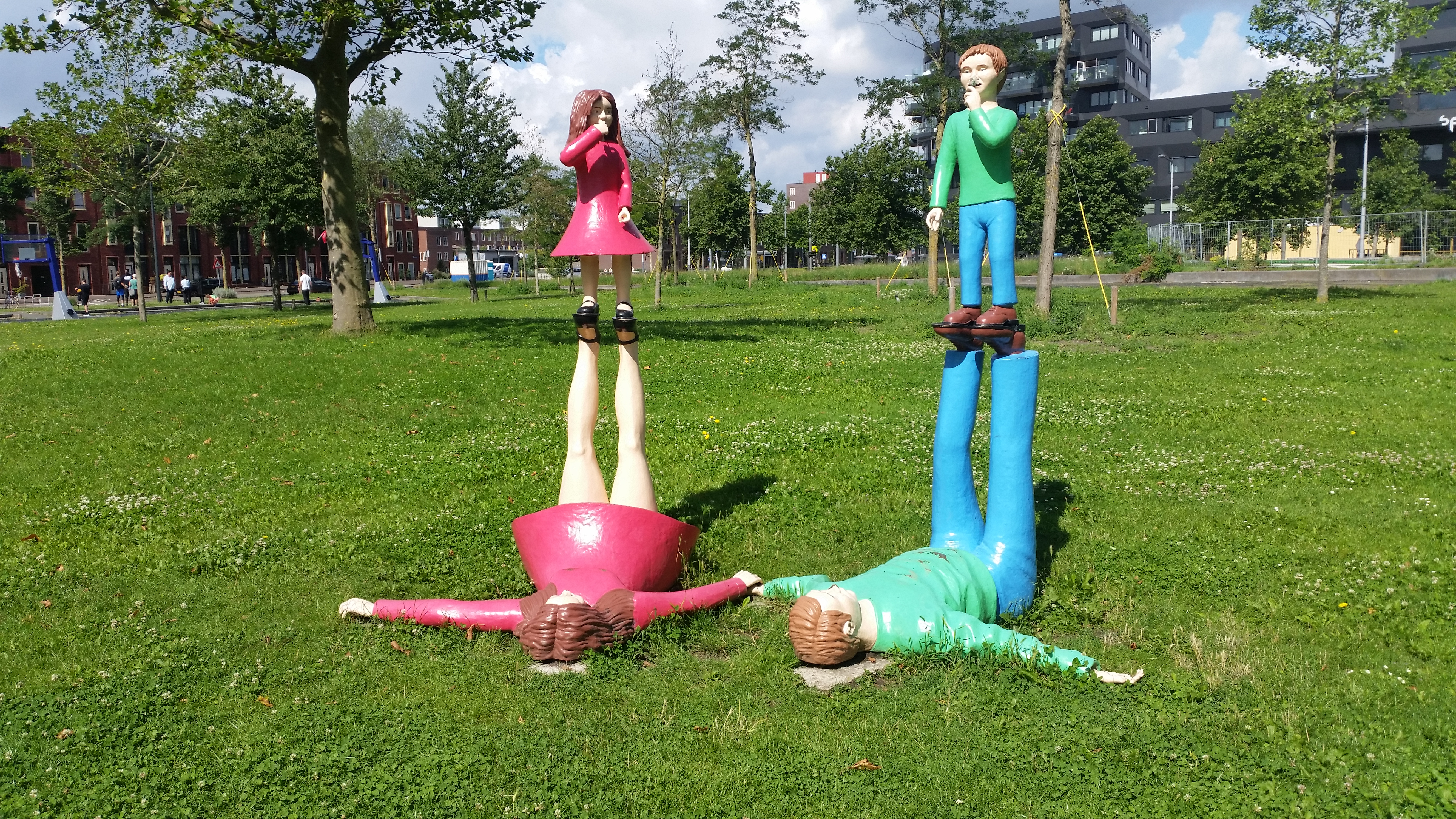 Impressie van Familie van Paul de Reus in het Theo van Goghpark, Amsterdam Oost